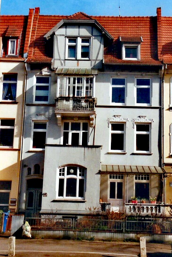 Bis 1907 bewohntes Haus von Heinrich Thiel in der Schwartauer Allee.